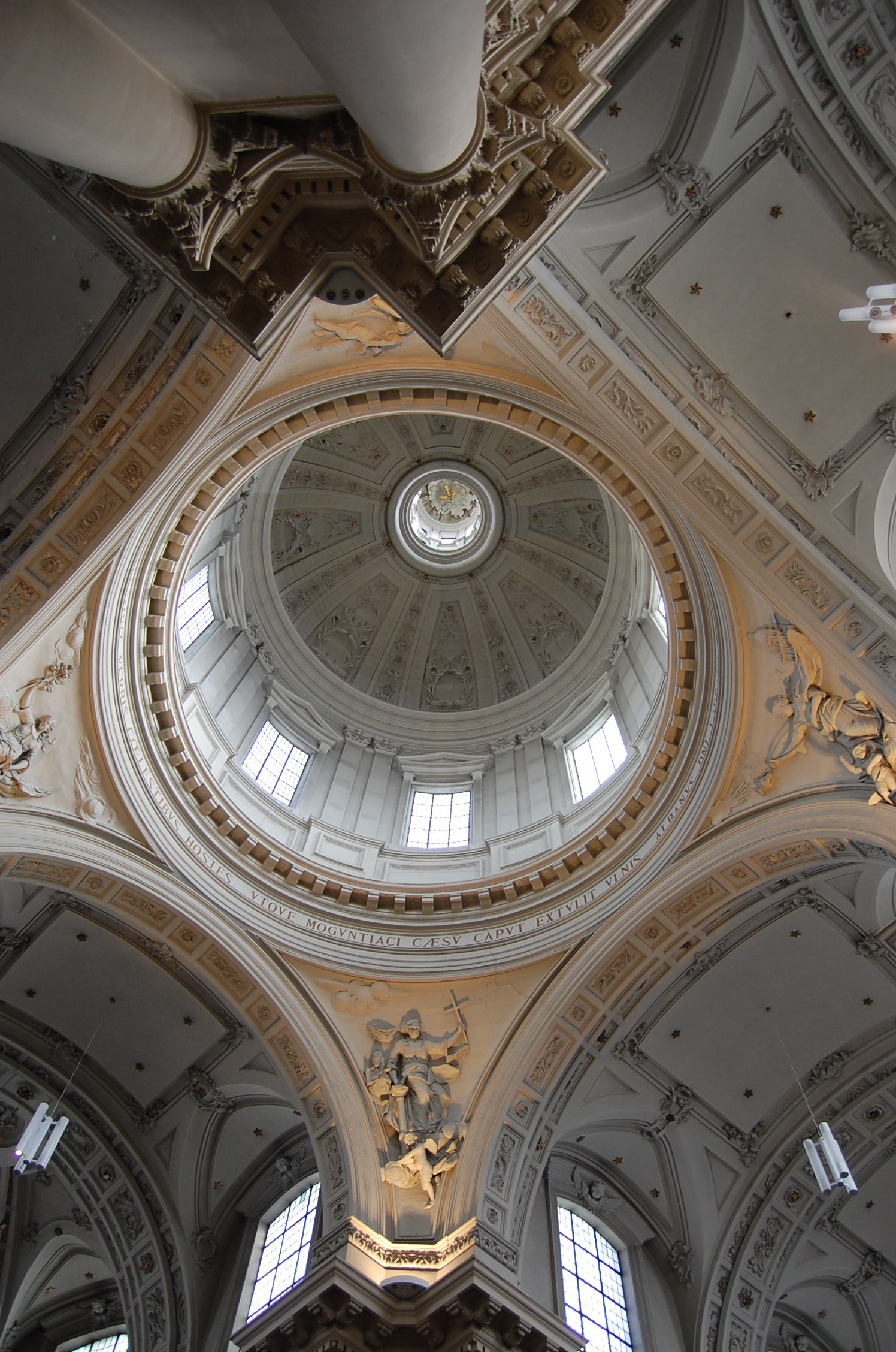 Cathédrale Saint-Aubain